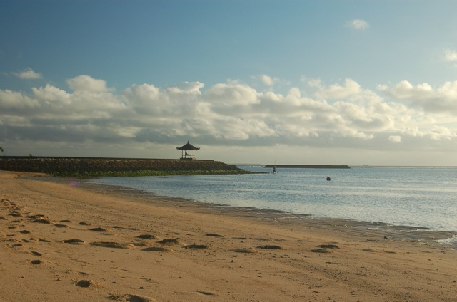 Nusa Dua, Bali, Indonesia